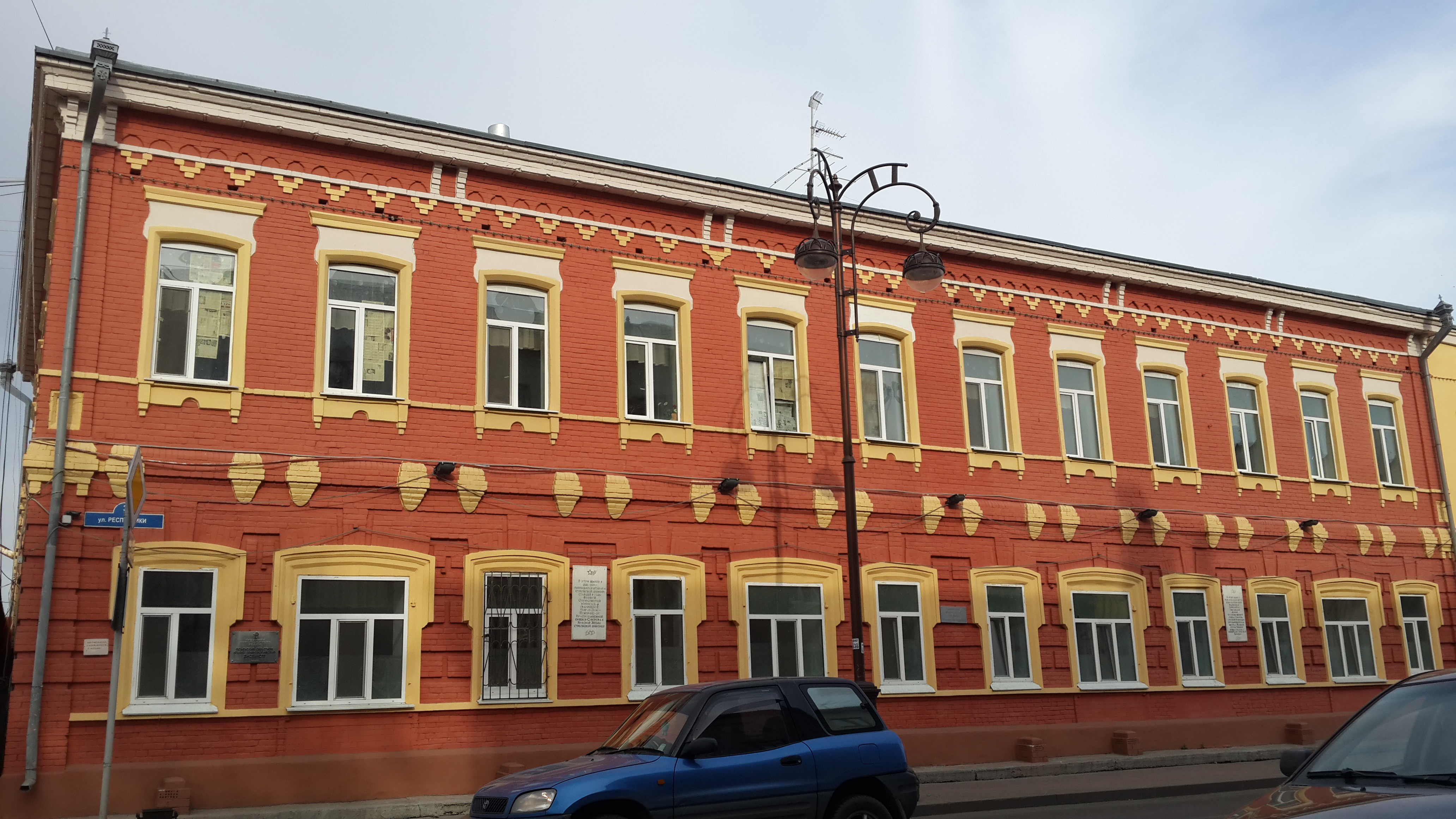 Дом жилой (Тюменская область, Тюмень, Республики улица, 3)